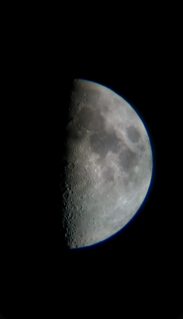 En la fase de Cuarto Creciente, la mitad de la superficie lunar se ve iluminada por el sol.